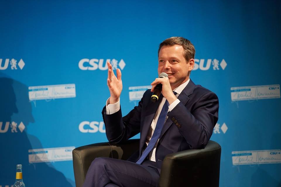 Thomas Silberhorn bei einer Diskussionsrunde